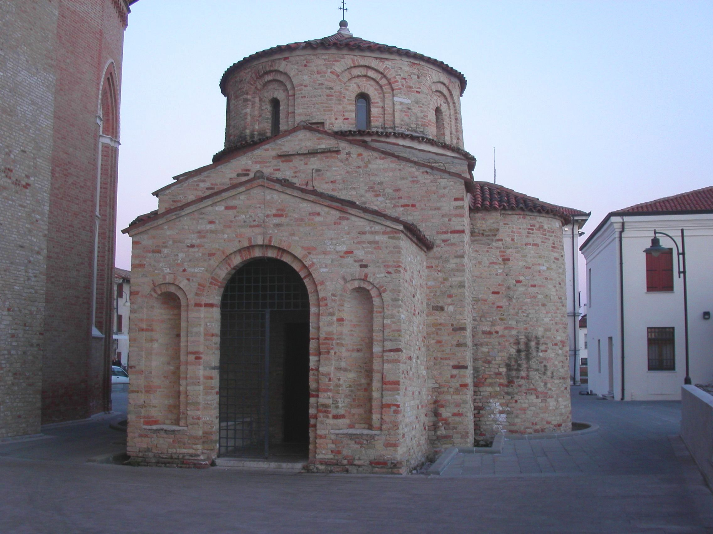 Concordia Sagittaria - Battistero